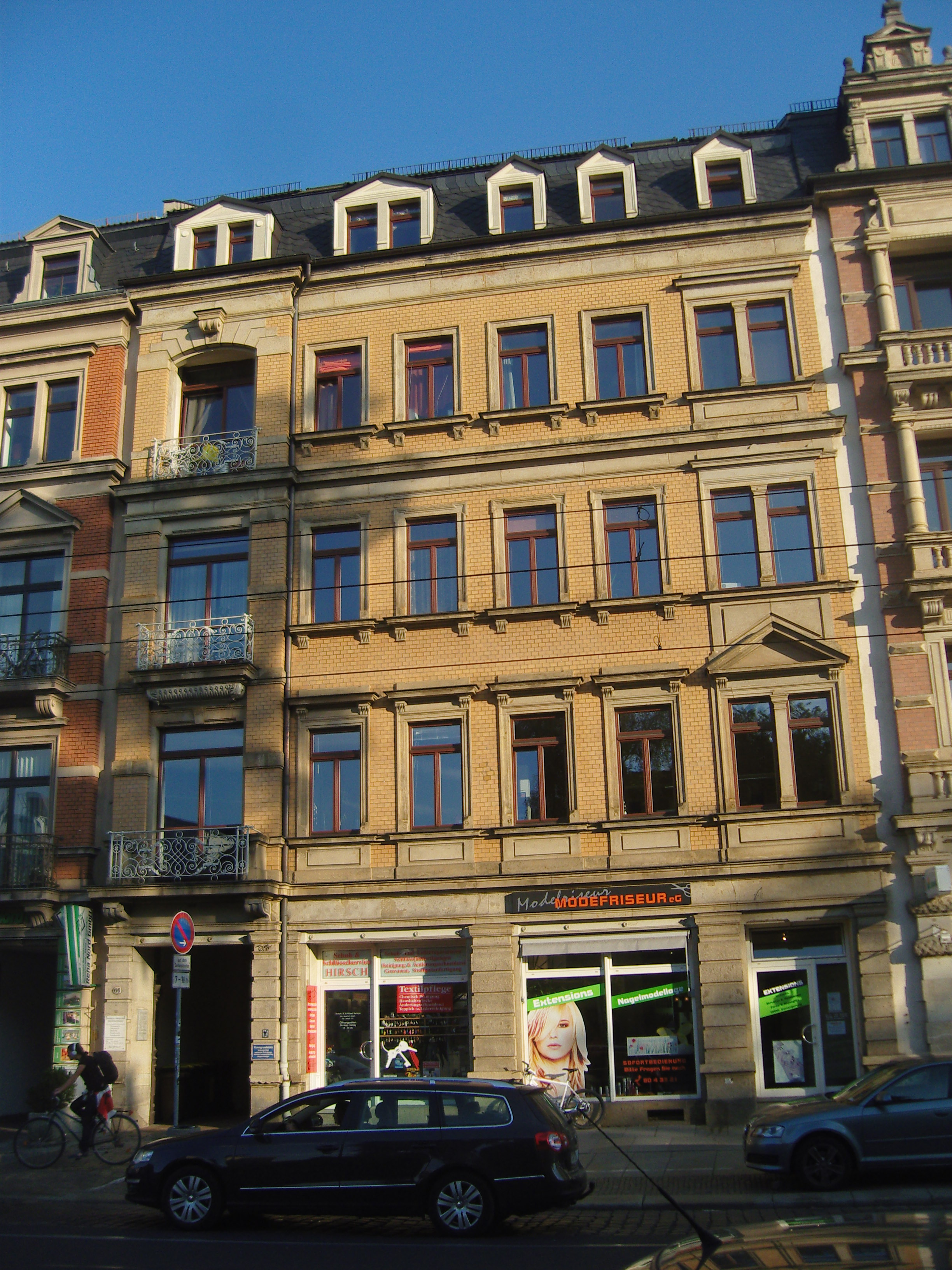 Denkmalgeschütztes Mietshaus mit Laden (Geburtshaus des Schriftstellers Erich Kästner) in der Königsbrücker Straße 66 in Dresden